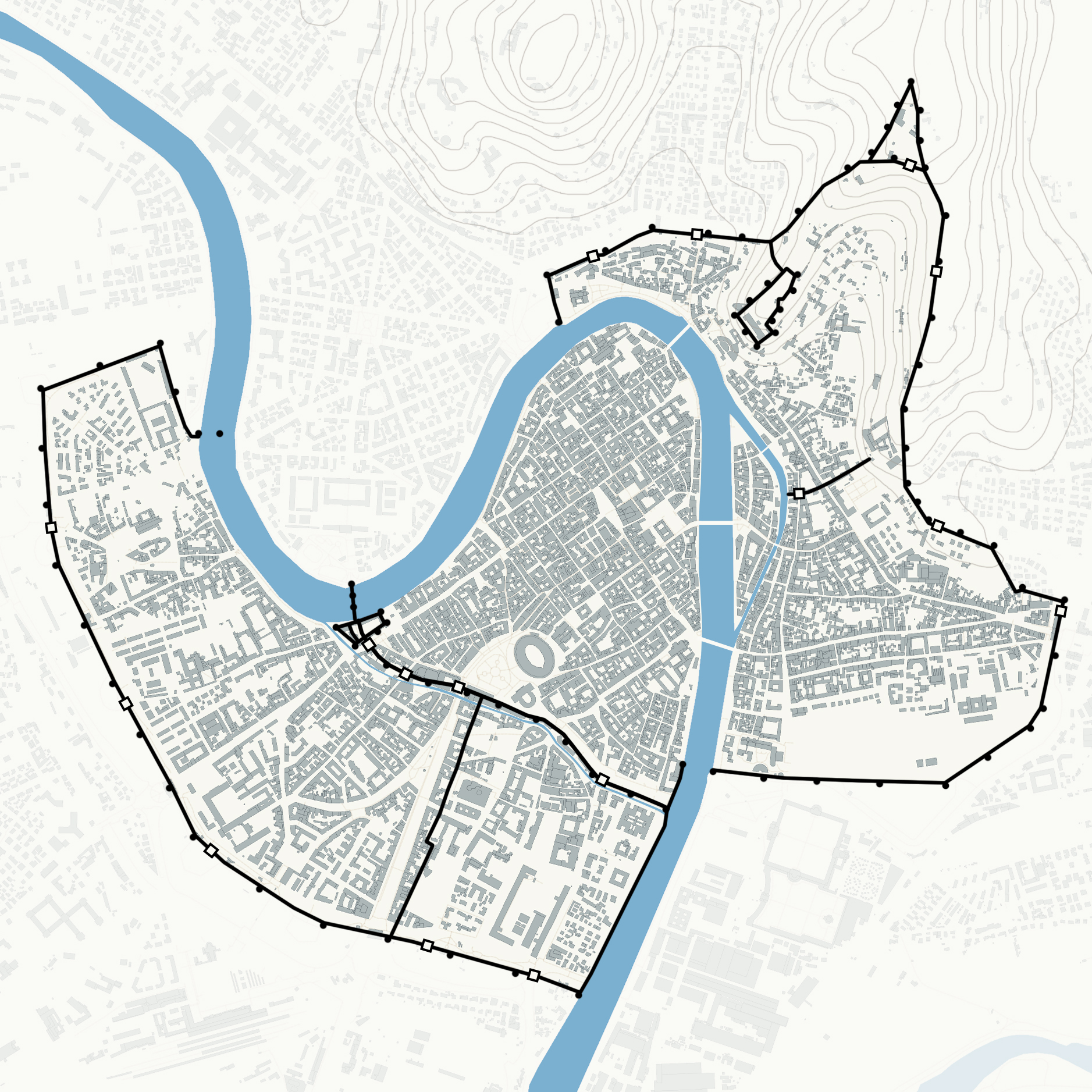 Planimetria della città di Verona con le mura e le porte urbiche principali. Vedi anche Le mura di Verona di Annamaria Conforti Calcagni.